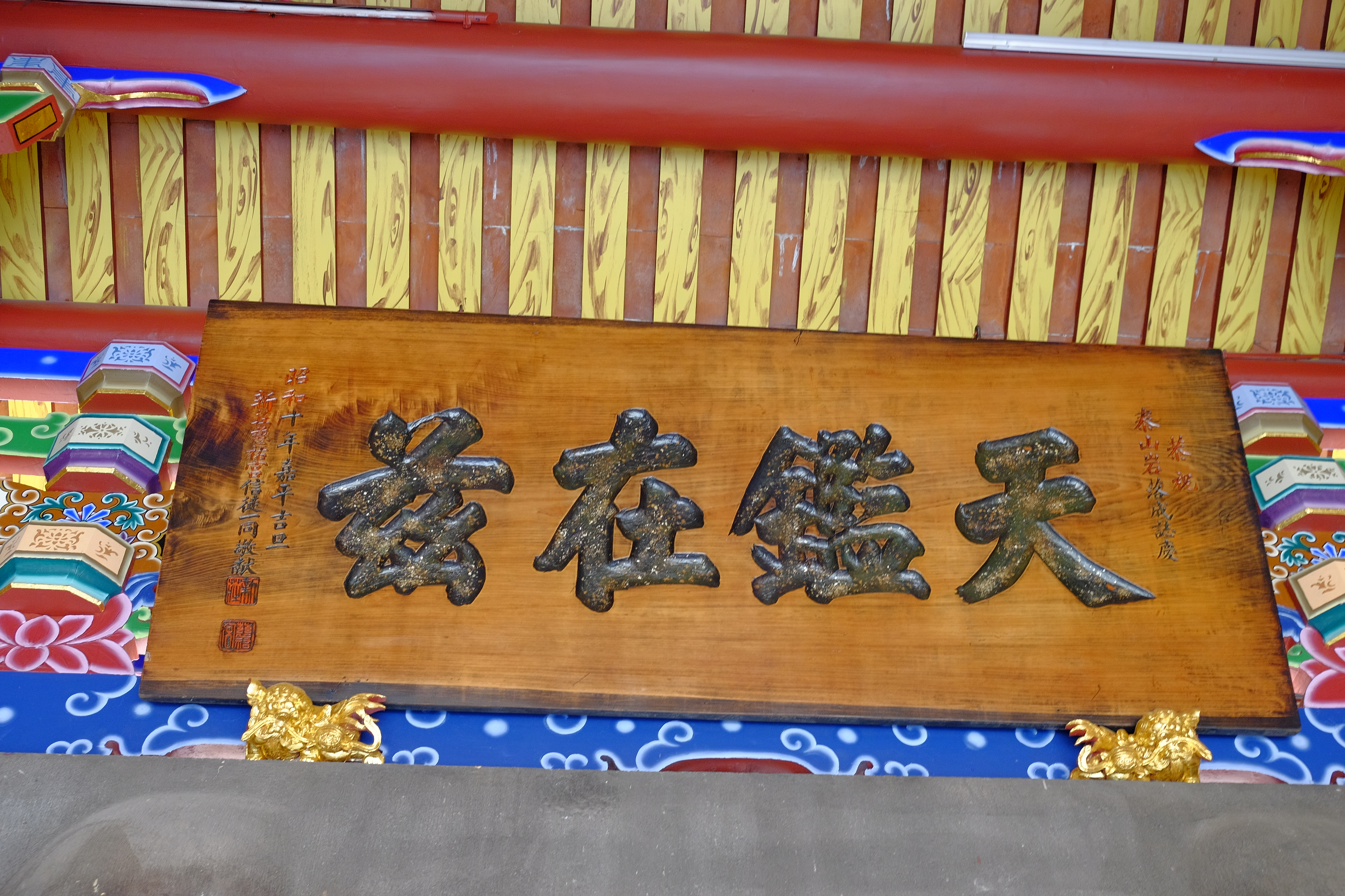 新莊慈祐宮贈頂泰山巖匾: 天鑑在茲